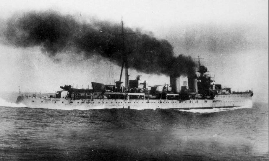 Crucero "Principe Alfonso", renombrado "Libertad" en 1931, renombrado "Galicia" en 1939, causó baja en 1970.